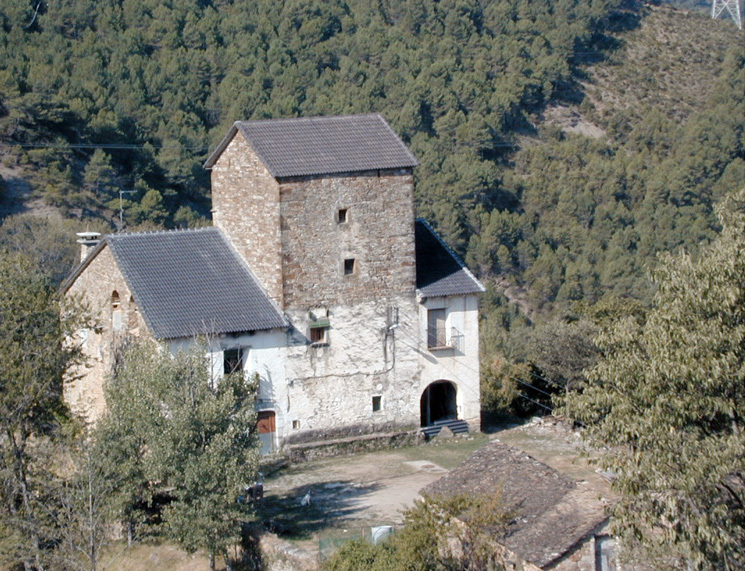 Casa torreada con dos adosados laterales de menor altura.